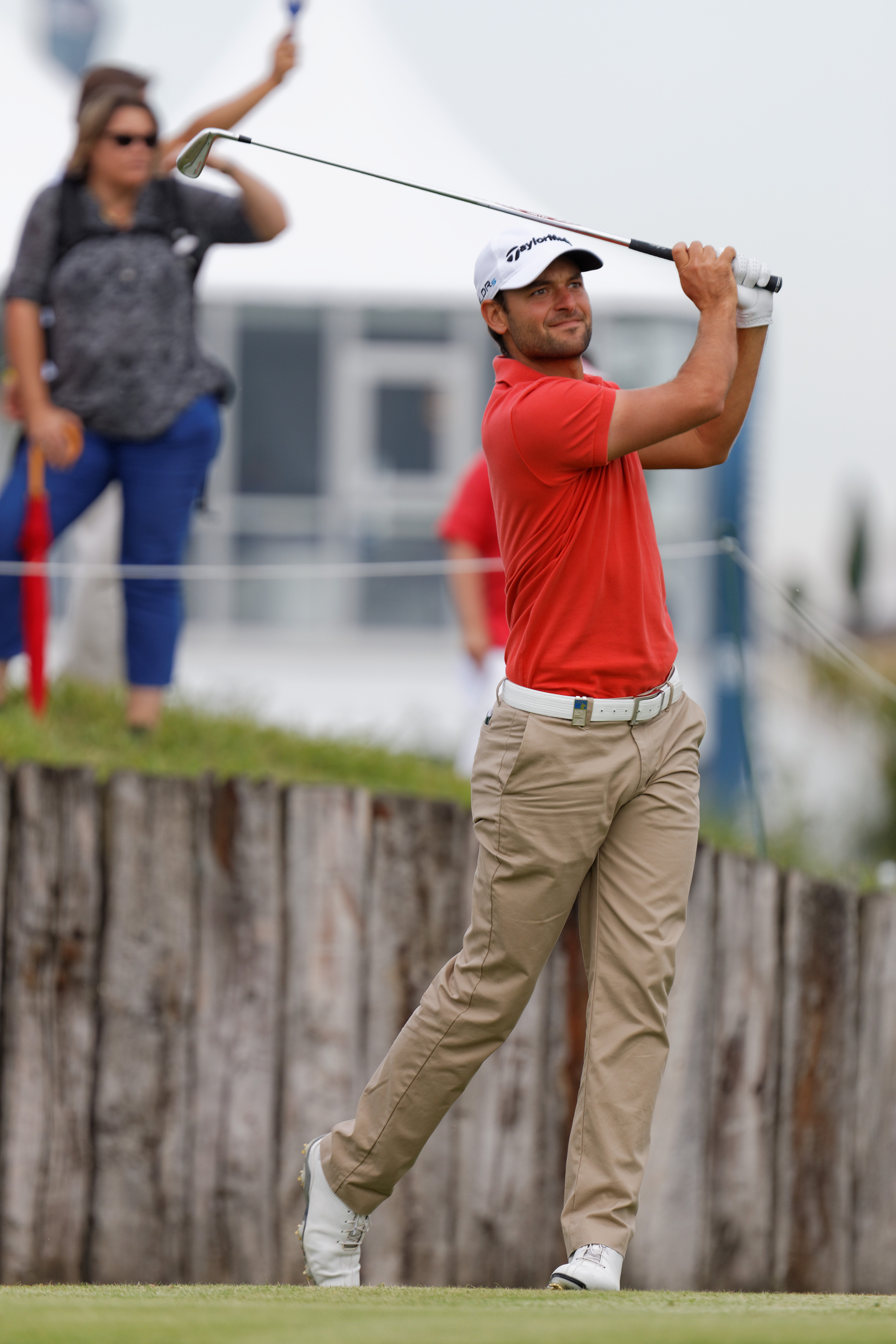 Carlos Del Moral lors du second tour de l'Open de France 2014 - Golf National - Saint-Quentin-en-Yvelines (78) - départ du trou n° 10